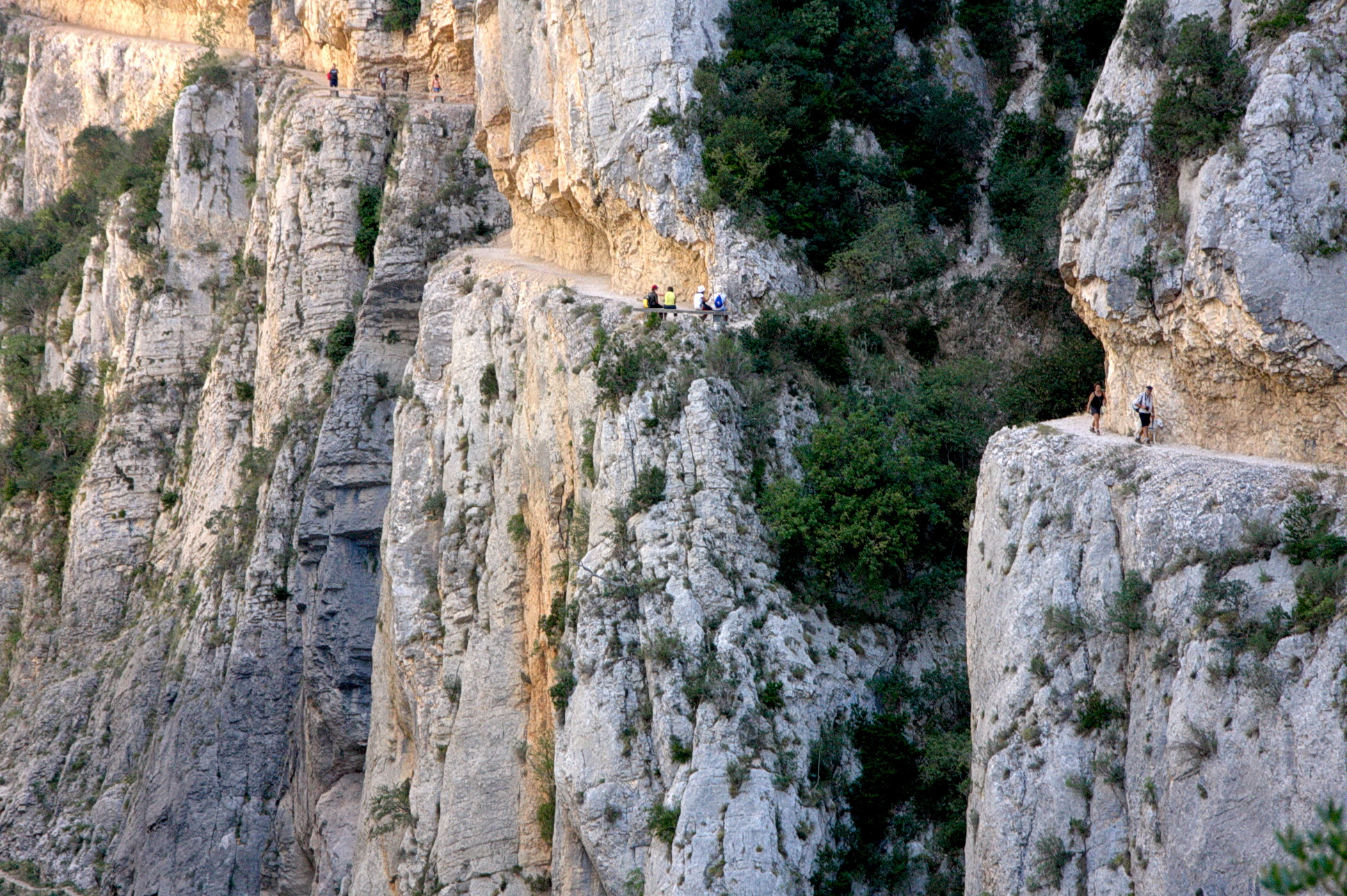 Congost de Mont-rebei - la Pertusa (Noguera) This is a a photo of a geologic site or geotope in Catalonia, Spain, with id: IEIGC-127